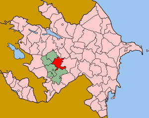 Map of Azerbaijan showing Agdam (Ağdam) rayon.